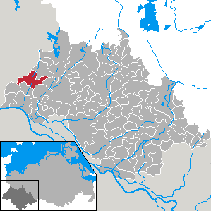 Greven in Mecklenburg-Vorpommern - district Ludwigslust